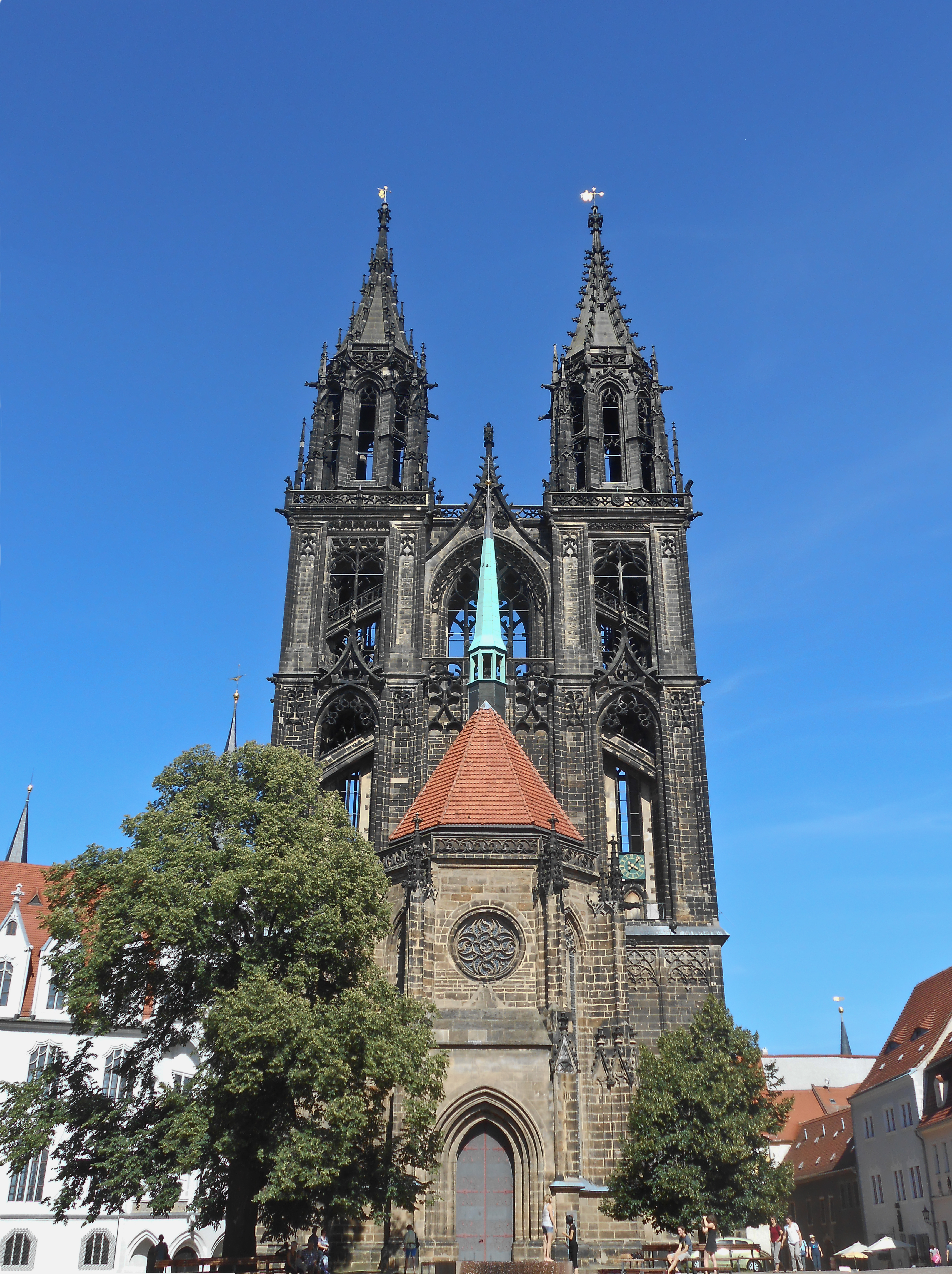 Blick über den Domplatz in Meißen (Sachsen, Deutschland) auf den Meißner Dom St. Johannis und St. Donatus.